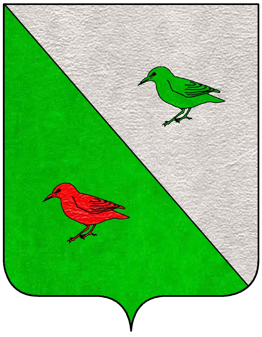 Stemma della famiglia Stornello, appartenente al patriziato di Venezia.